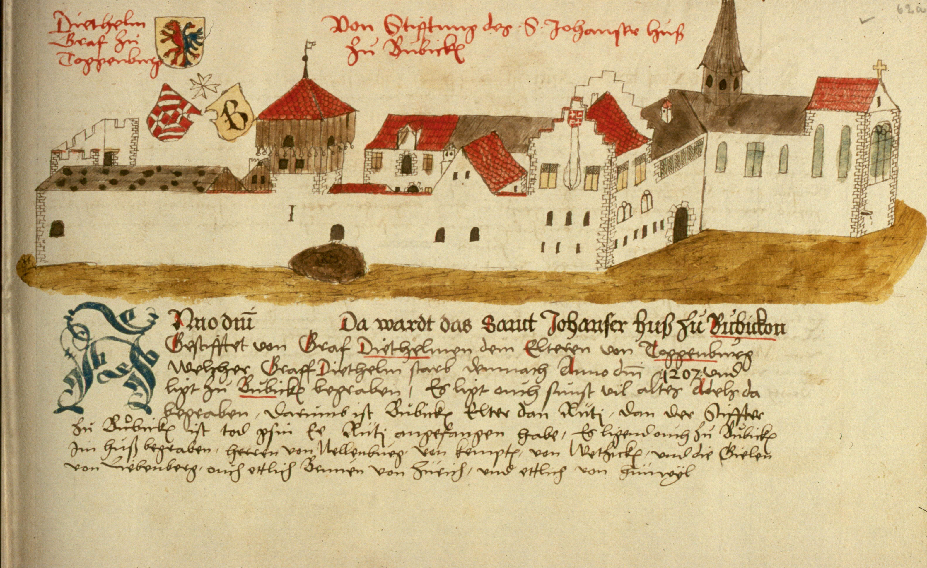 Die Johanniterkommende Bubikon ca. 1530 mit dem alten Wappen der Freiherren von Toggenburg, des Komturs Johann von Hattstein und der Kommende. Die Zeichnung wird Johannes Stumpf zugeschrieben. Zeichnung aus der Schweizer- und Reformationschronik von Johannes Stumpf, entstanden 1530–1535. Zentralbibliothek Zürich.